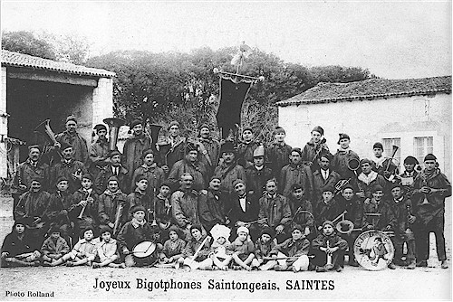 Vers 1930.